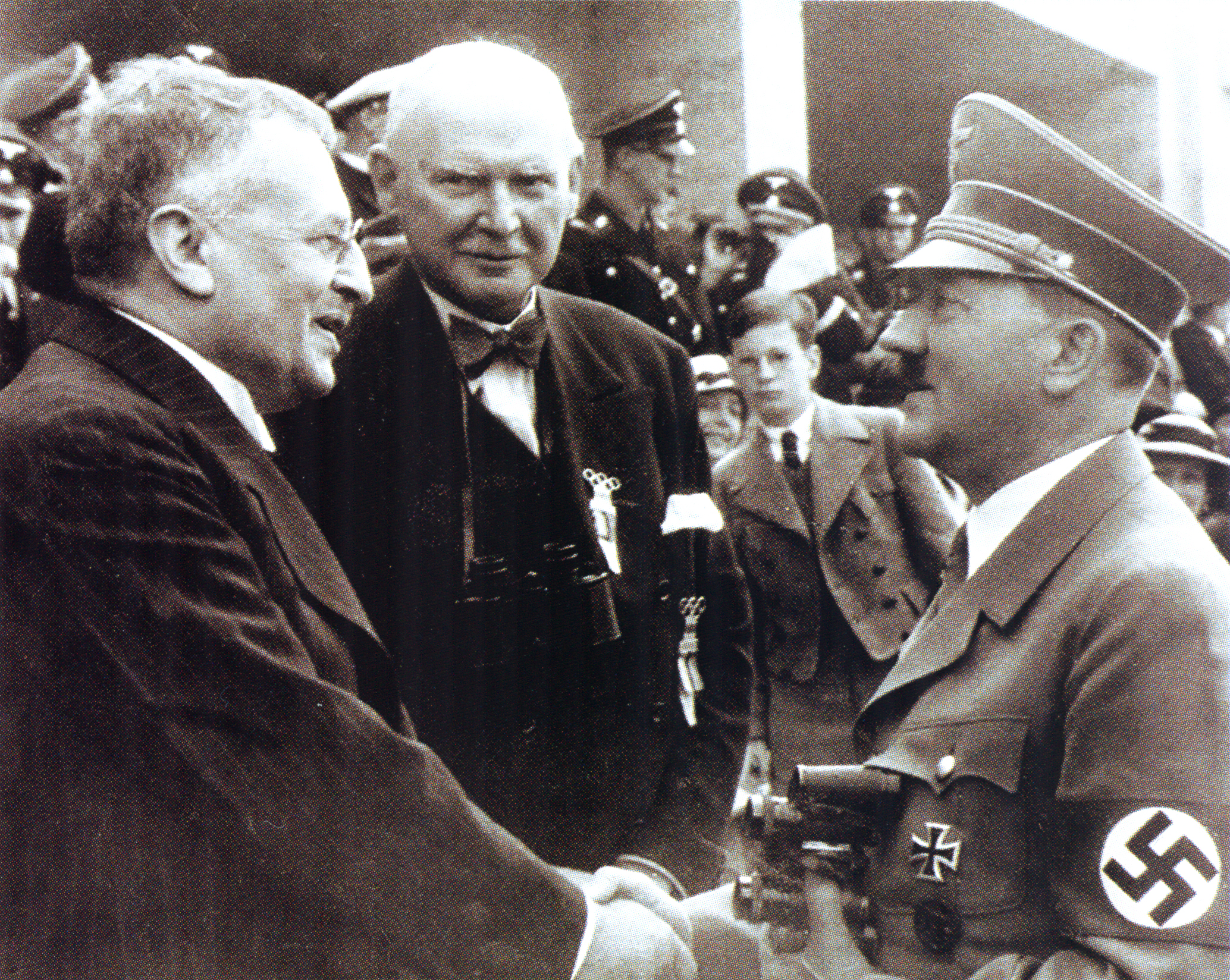 Sven Hedin hälsar på Adolf Hitler under OS i Berlin 1936.